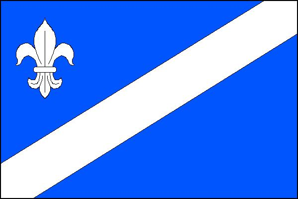 Vlajka obce Modlíkov